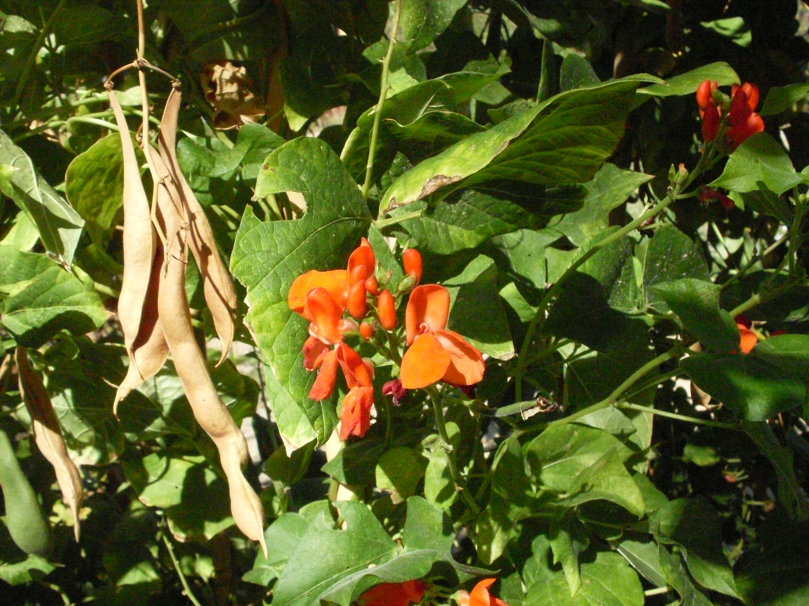 Haricot d'Espagne ou haricot écarlate dans le jardin botanique Henri-Gaussen, Toulouse, France